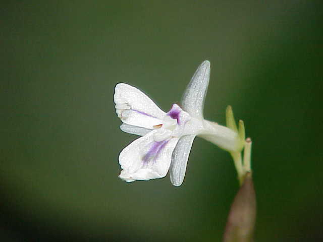 Species: Maranta leuconeura Family: Marantaceae Image No. 1